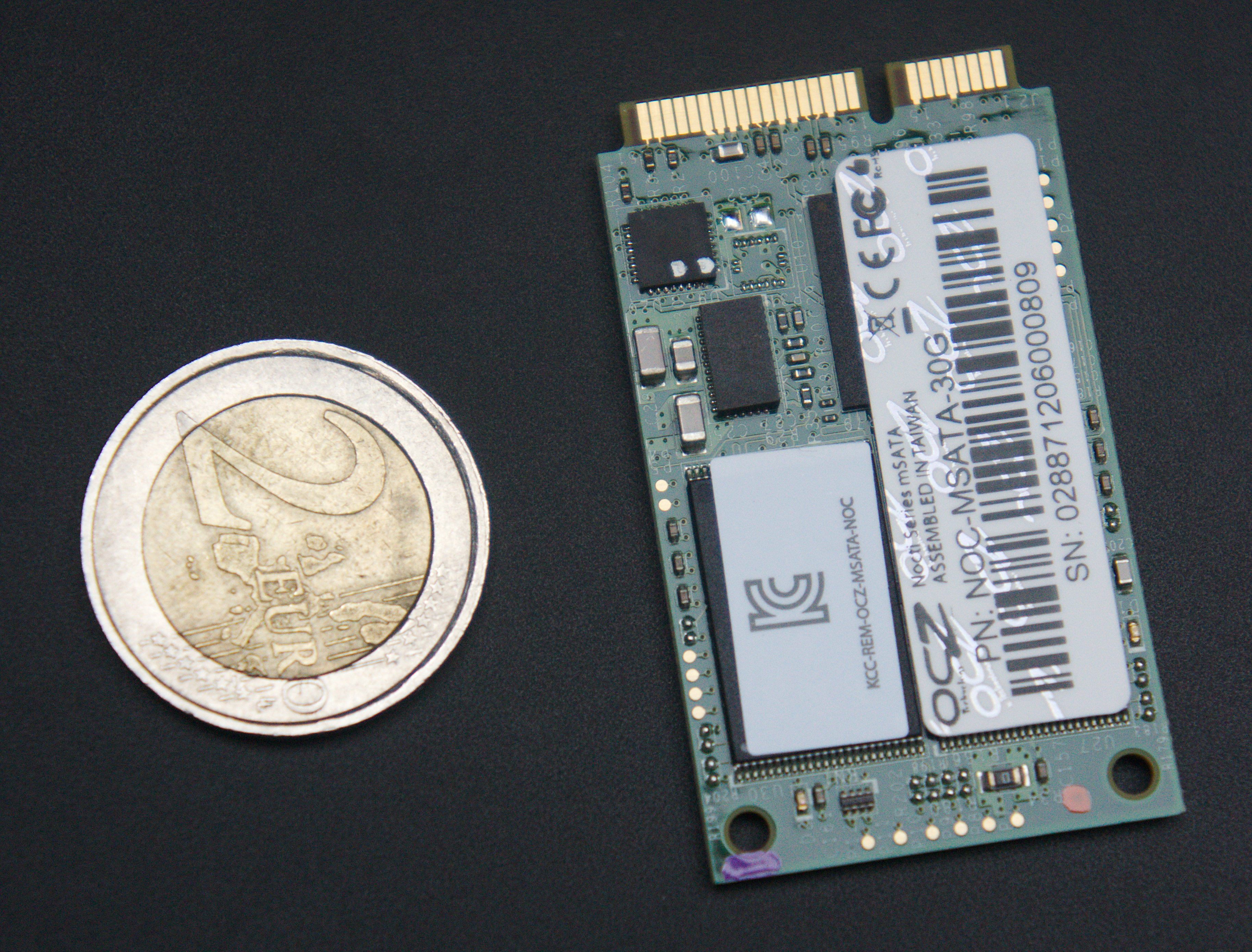 Comparaison disque type SSD en format mSATA et d'une pièce de 2 euros.